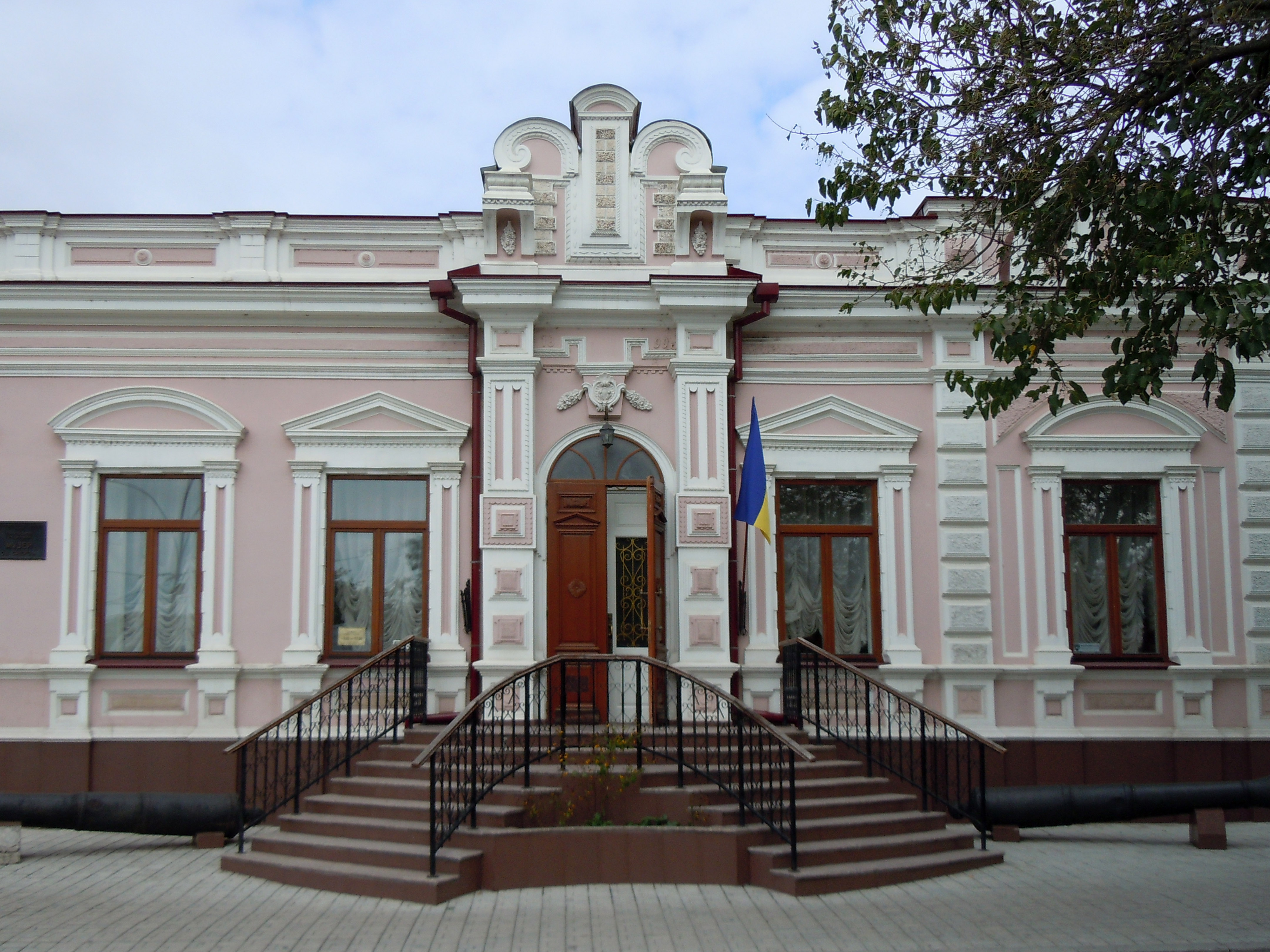 Особняк, Ізмаїл, Пушкина вул., 37 (ріг пр. Суворова)